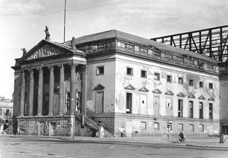 Illus Schmidtke 26.6.1951 Die ehemalige Staatsoper in Berlin. In seiner alten Schönheit unter Wahrung der Knobelsdorftschen Architektur wird das Gebäude der Staatsoper Unter den Linden so wiederhergestellt, wie es vor den Umbauten unter der Hitler-Diktatur und den Zerstörungen durch den Bombenkrieg bestand. Mit den Arbeiten soll unmittelbar nach den Weltfestspielen der Jugend und Studenten begonnen werden.